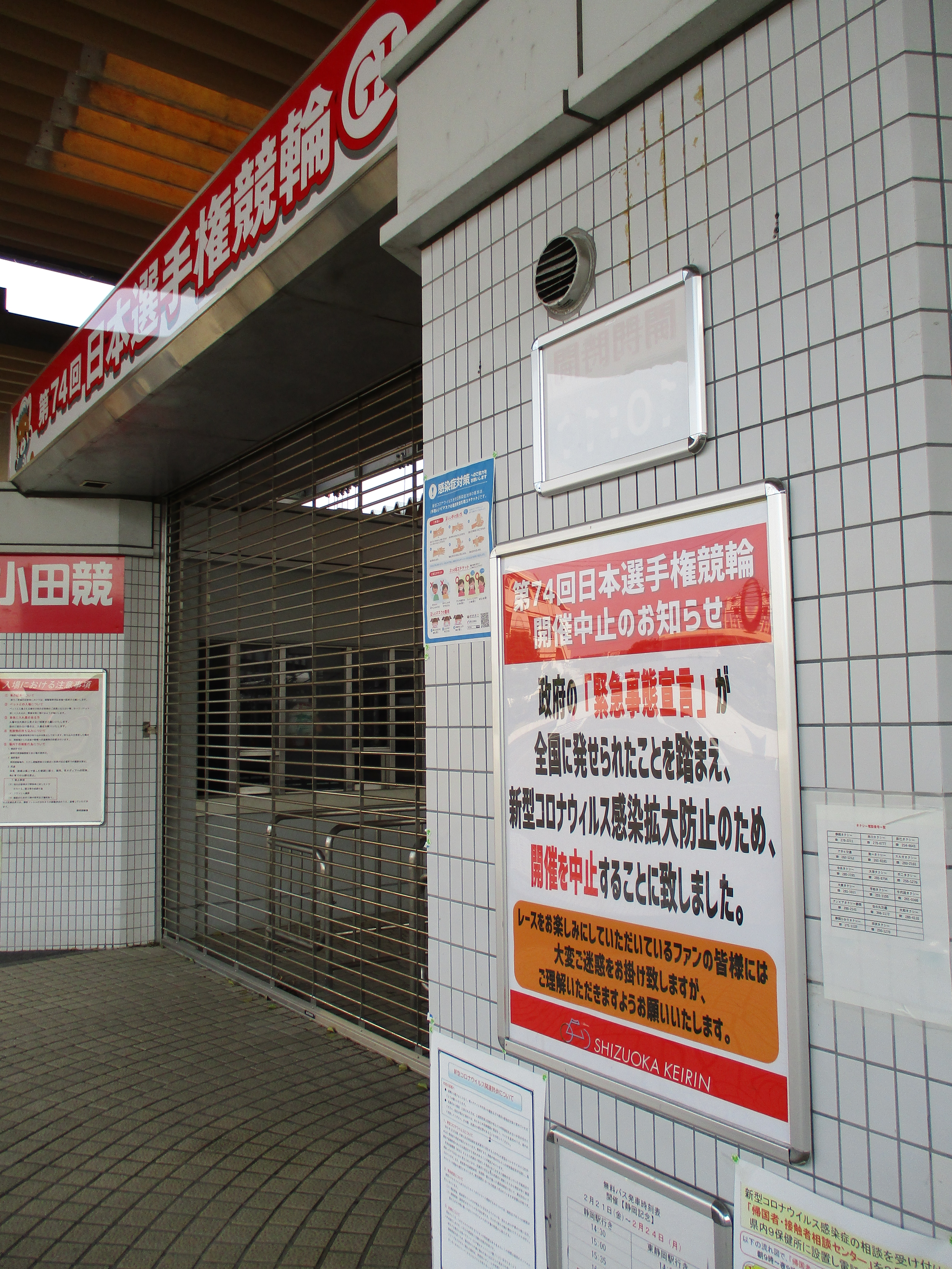 第73回日本選手権競輪（競輪ダービー）がCOVID-19により中止されたことをしめす掲示。静岡競輪場の正門にて撮影。